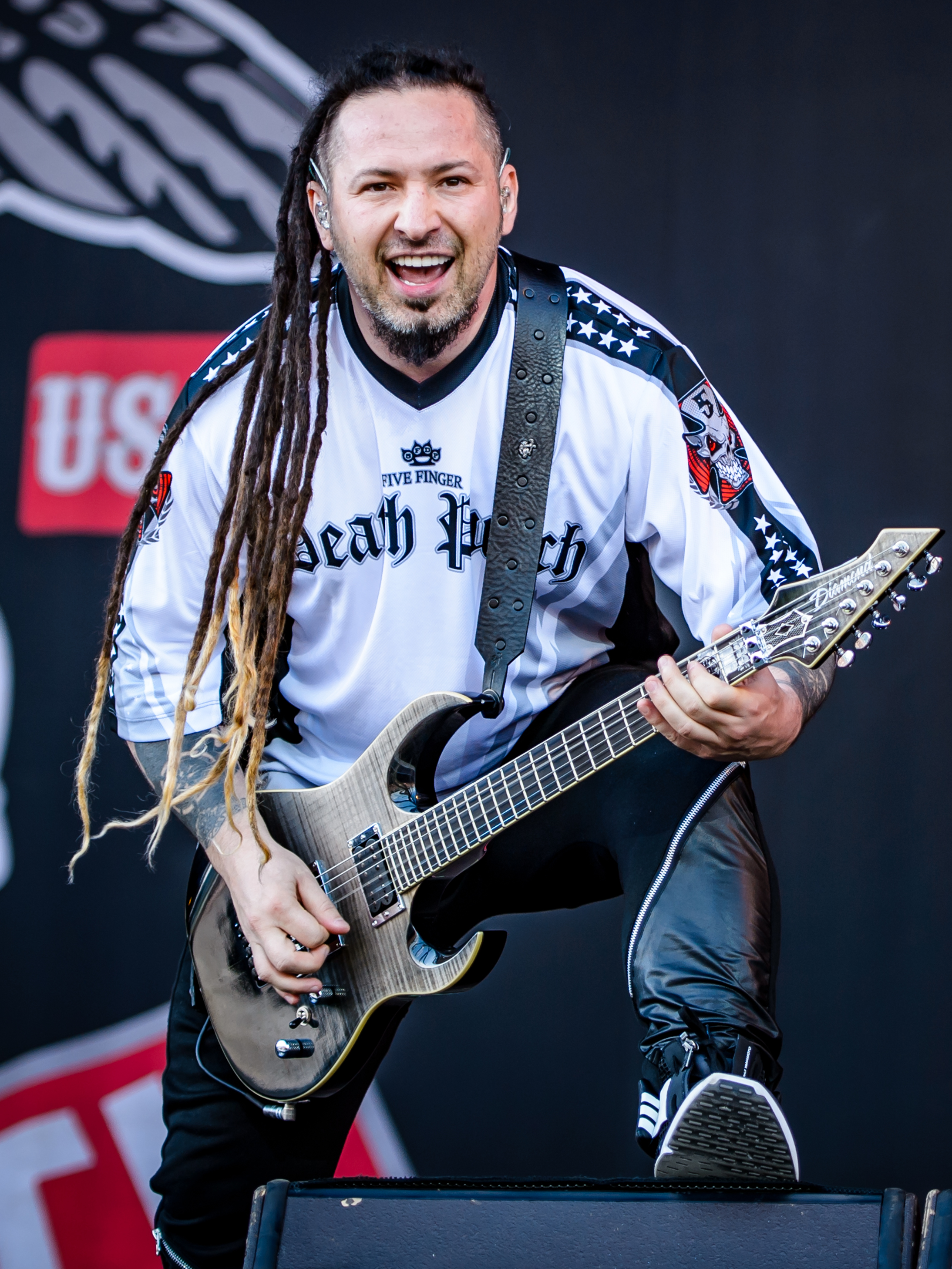 'Rock im Park 2017; Nürnberg': 'Five Finger Death Punch'